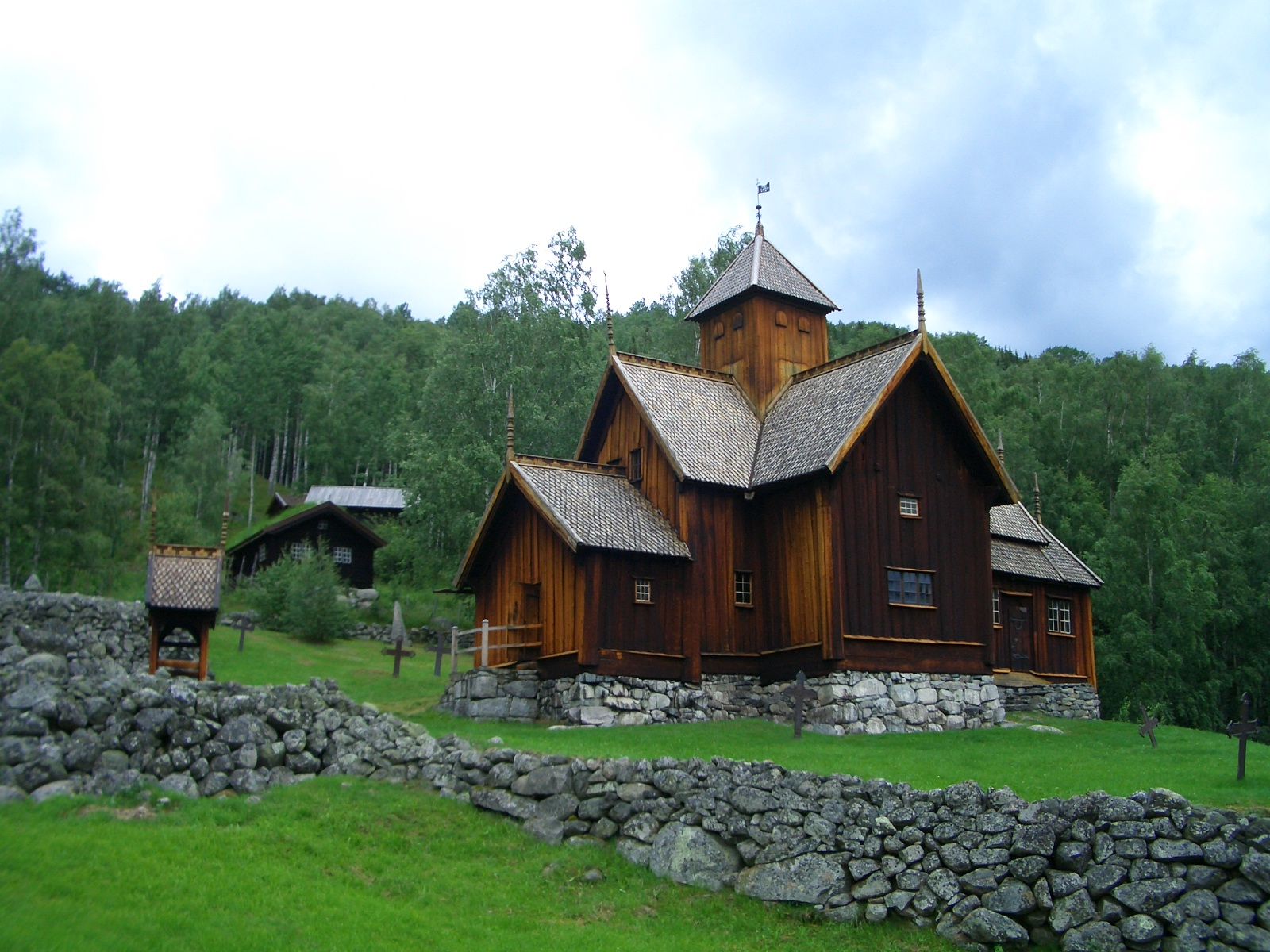 Uvdal stavkirke er en korskirke i Uvdal i Nore og Uvdal kommune i Buskerud, Norge. .